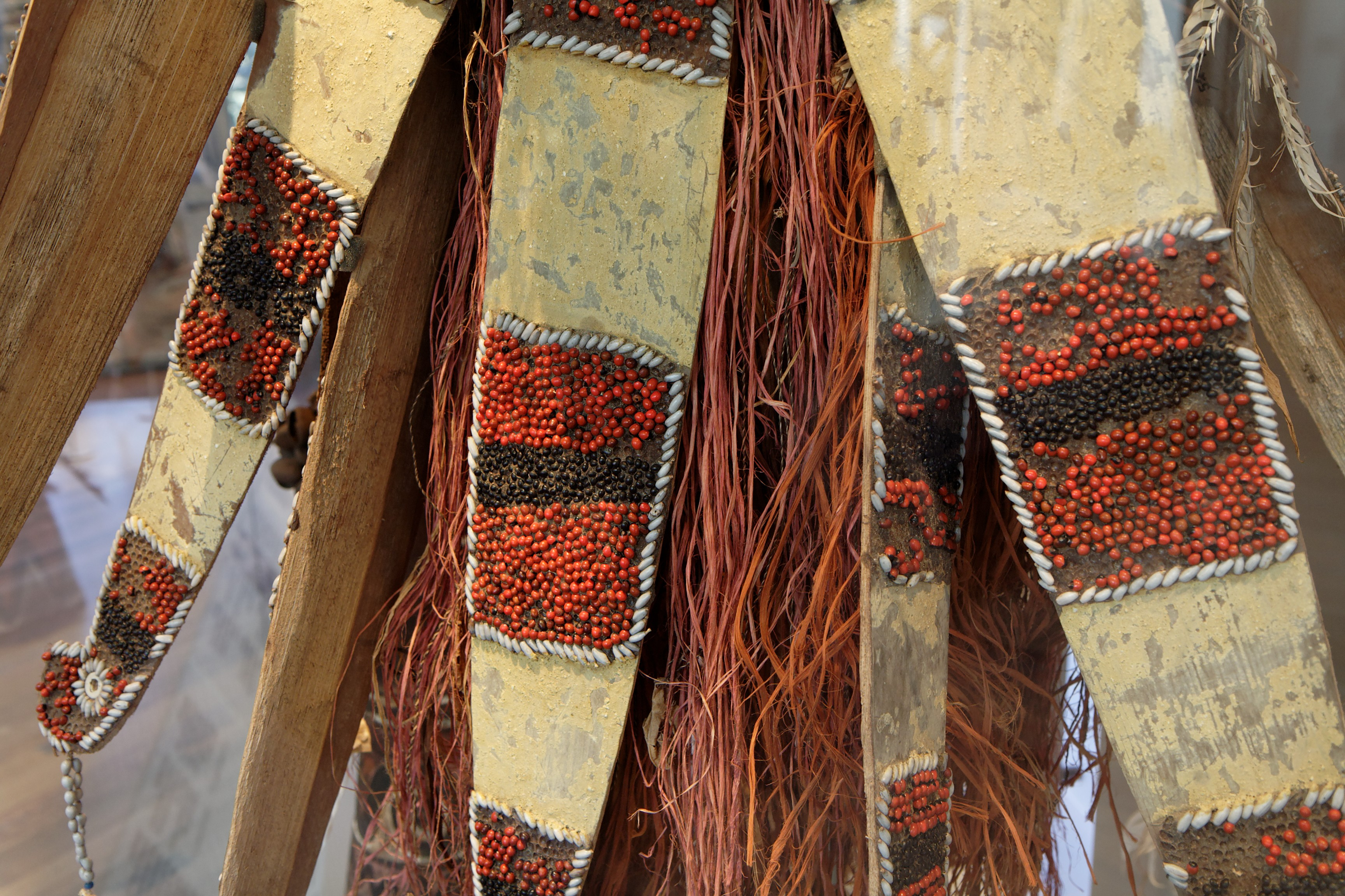 Dema-Vitrine (526-5 A t/m K) 090612-132208_ 0574_350D_raw